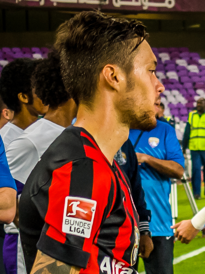 Václav Kadlec nach einem Freundschaftsspiel im Januar 2015